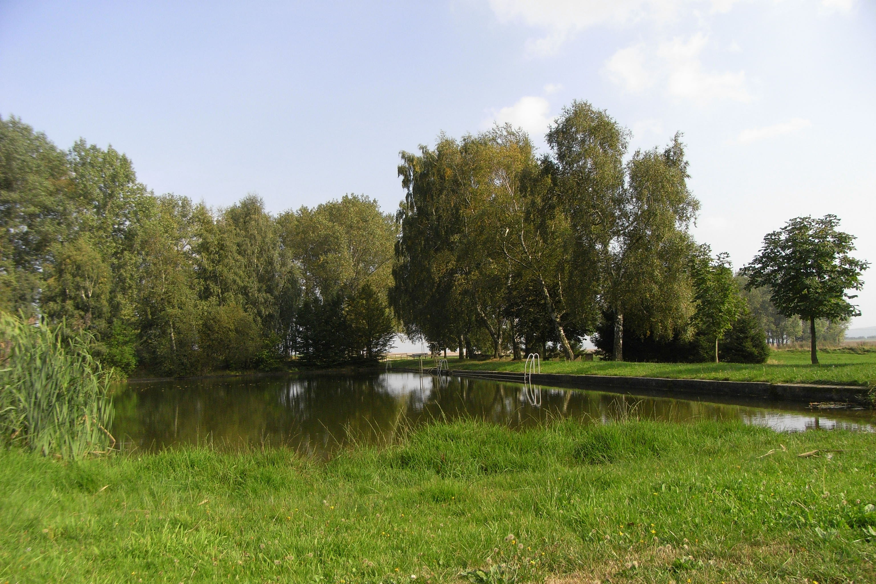 Der Ziegelteich (alt: Ziegeleiteich) in Frankenthal ist ein Badeteich mit Quellzufluss der Schwarzen Röder.